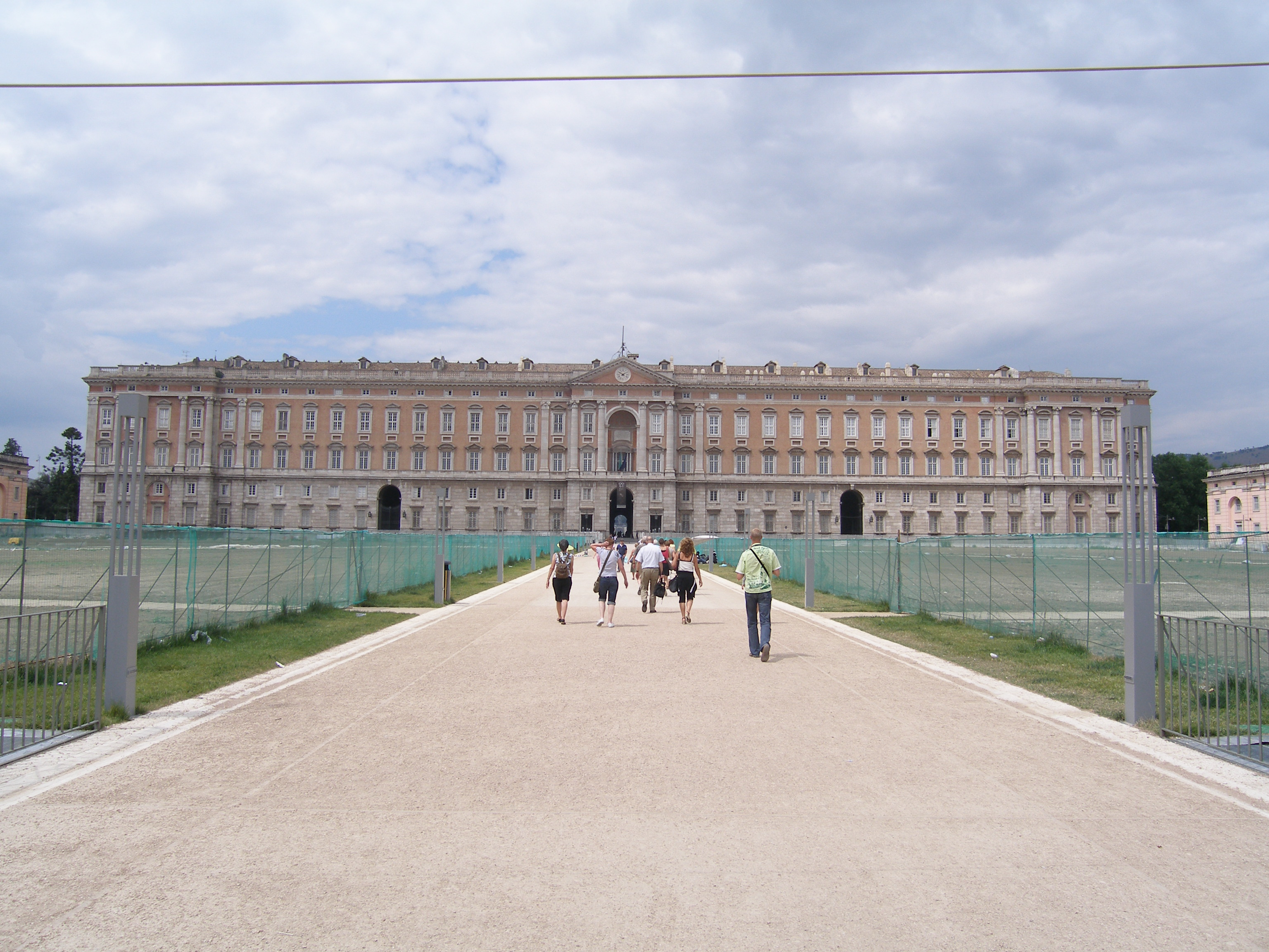 Vooraanzijde Paleis Caserta